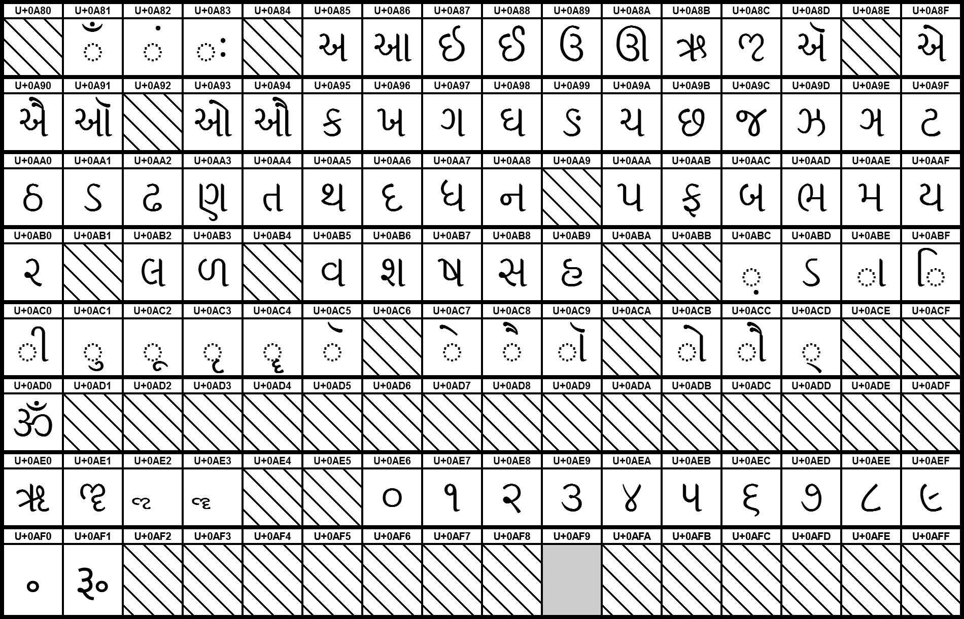 Grafiktafel für den Unicodeblock Gujarati. Schraffierte Felder sind unbesetzte Codepoints.